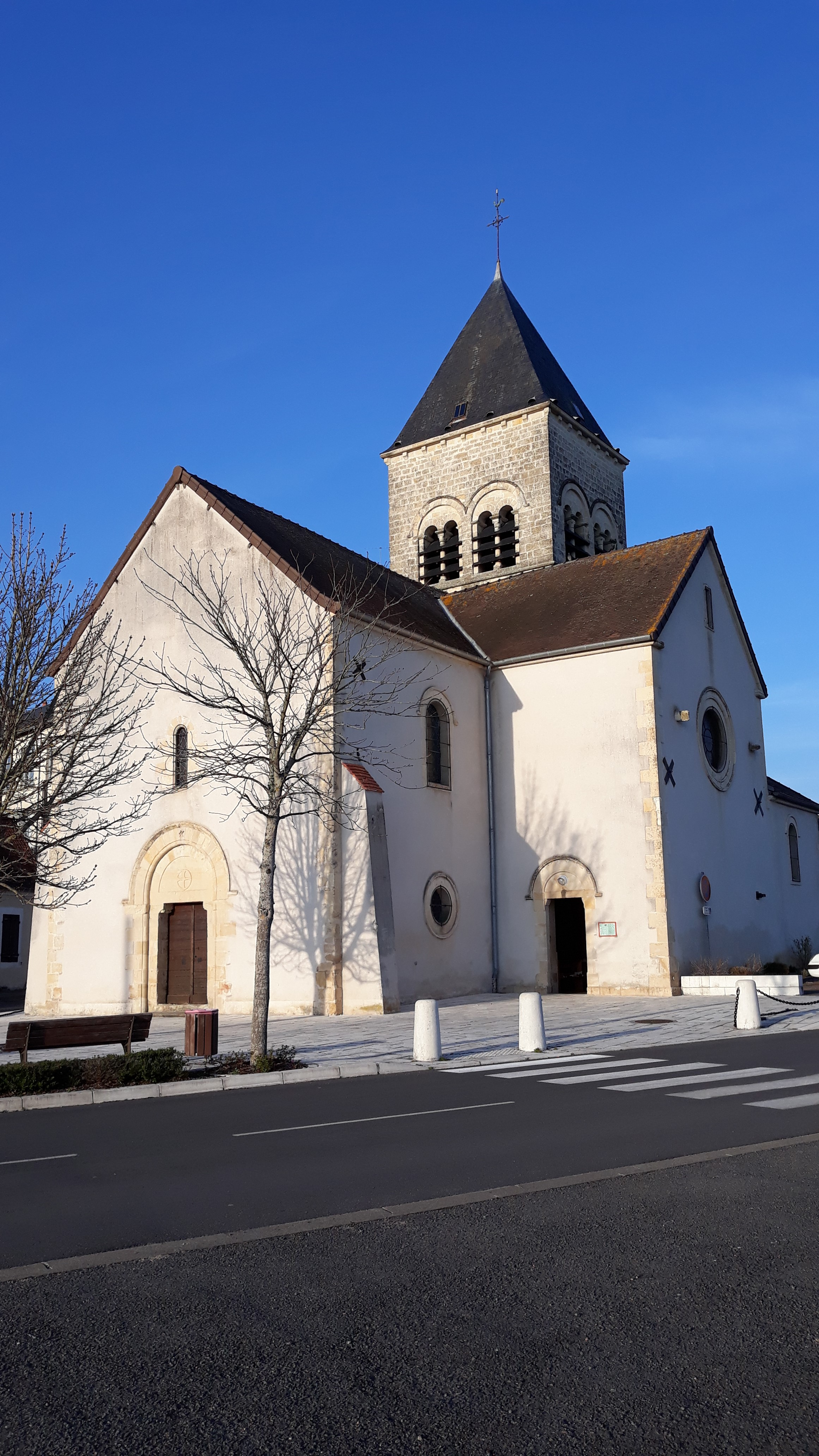 Eglise du XIIème siècle